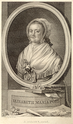 Portret van Elisabeth Maria Post. Zelf vond ze dat het teveel ‘norse fierheid’ uitstraalde (bron: DVN)